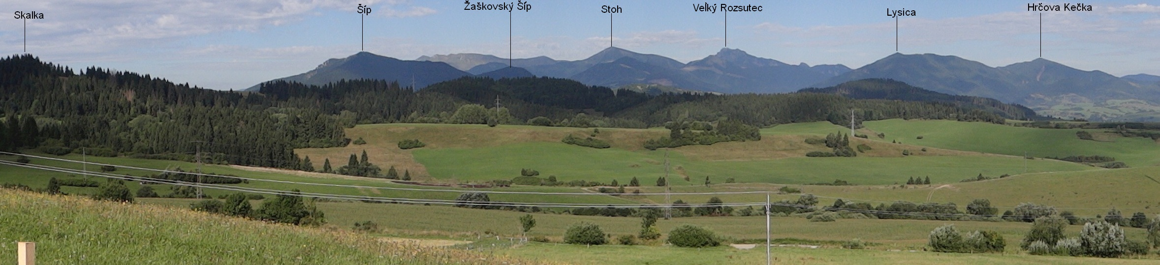 Views from parking E77